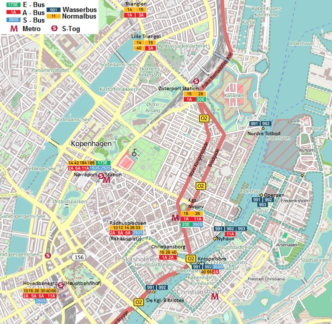 Umsteigepunkte Innenstadt Kopehagen